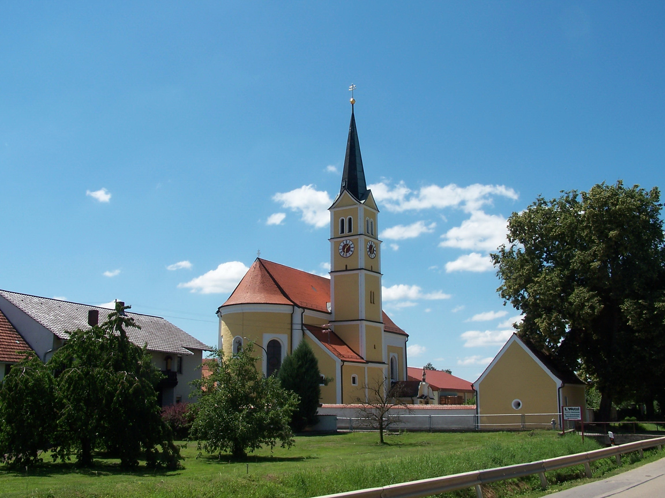 Langenerling, Erlenbachstraße 48. Kath. Pfarrkirche St. Johannes Baptist, Saalkirche mit eingezogenem Chor, Flankenturm, ehem. Vorzeichen, jetzt Lourdesgrotte, und Rahmengliederungen, 1716-18 wohl von Joseph Baader, Umbau 1829; mit Ausstattung; Friedhofsmauer, Bruchstein, 18./19. Jh.